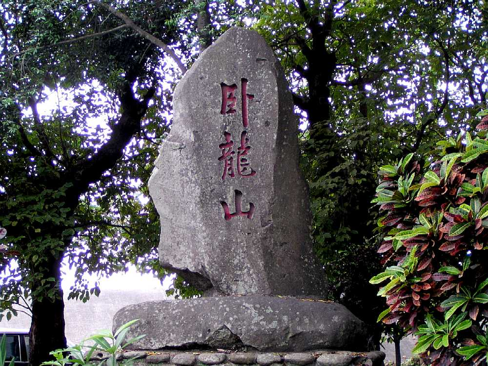 雲林龍岩糖廠臥龍山石碑。